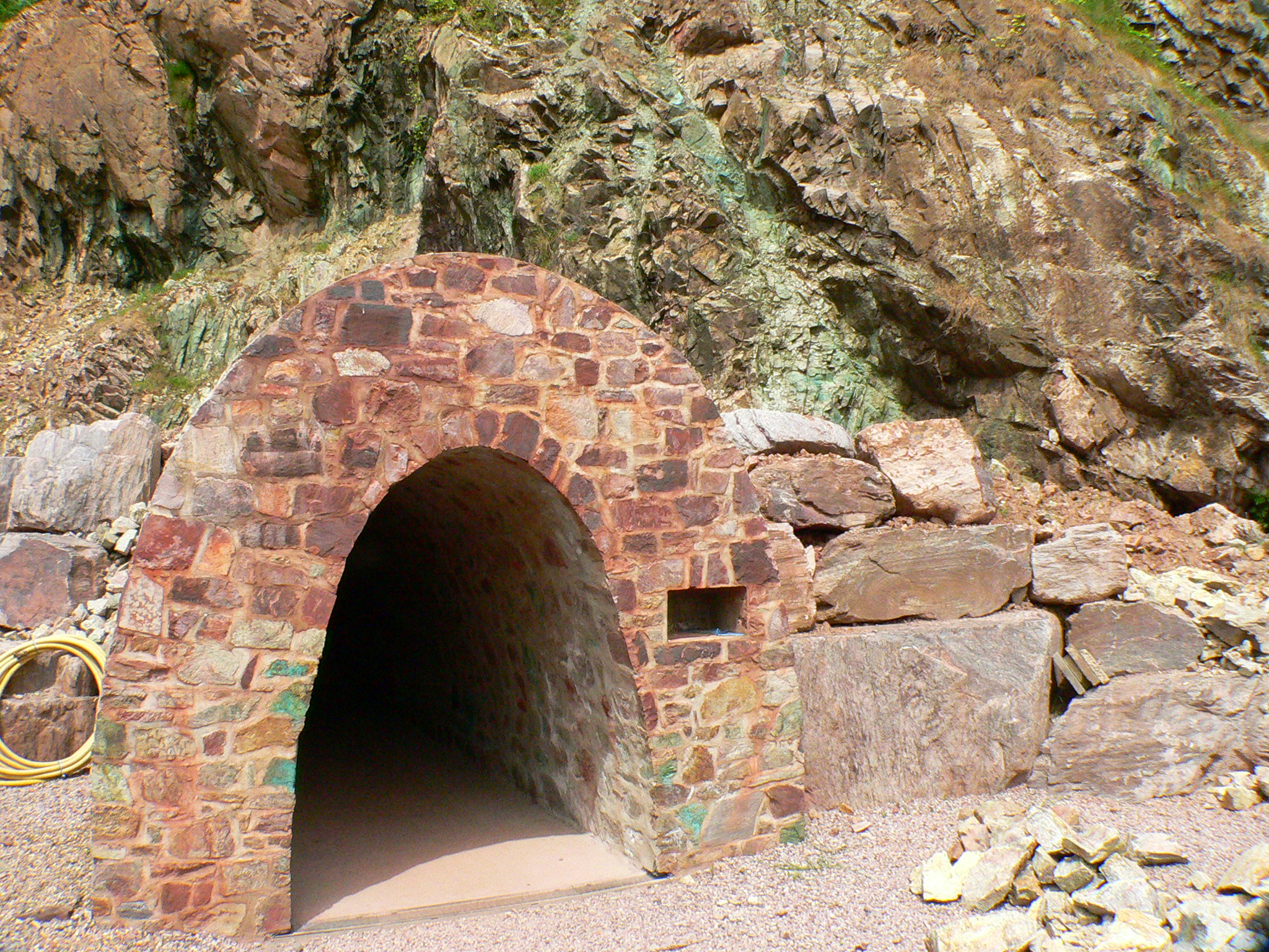 ehem. Kupfergrube "Wilhelmine" in Sommerkahl bei Aschaffenburg, Deutschland - neuer Stollenmund